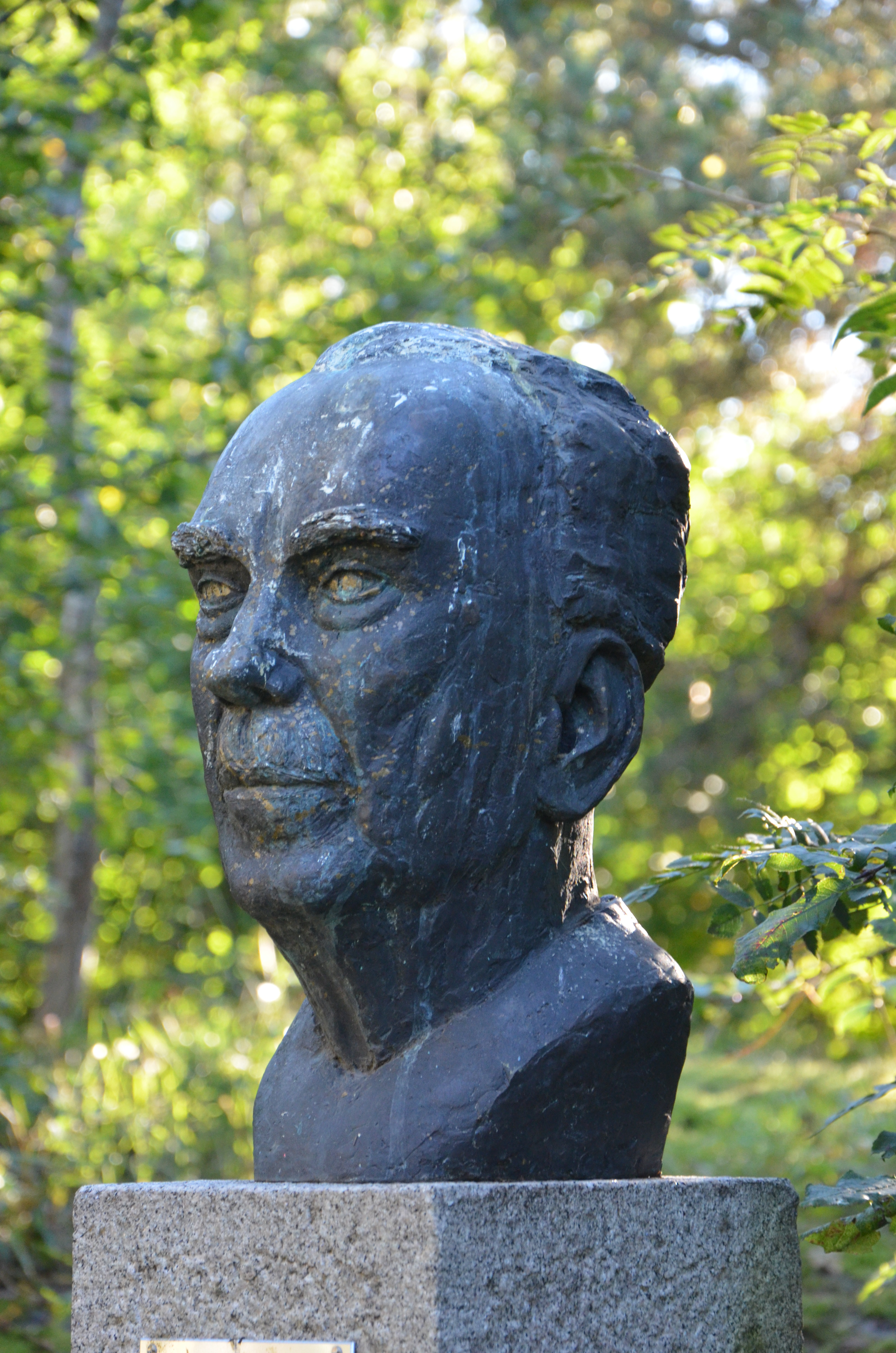 Britt-Marie Jerns byst över Artur Lundkvist, brons, 1993, Artur Lundkvists park i Solna. It is not clear whether freedom of panorama applies to this image. This is a depiction of a work of art in Sweden. The depicted work is believed to be protected by copyright. According to Article 24 of the Swedish copyright act, "Works of art may be depicted if they are permanently placed on or at a public place outdoors. Buildings may be freely depicted." It has been widely accepted that this provision made distribution of depictions such as this one legal. On 4 April 2016, however, the Supreme Court of Sweden issued a statement that Article 24 does not extend to publication in online repositories, and on 6 July 2017, a lower court ruled that linking to depictions of copyrighted artworks hosted on Commons constitutes copyright infringement. See Commons:Freedom of panorama#Sweden for more information. The implications of these decisions on Commons' ability to continue to distribute this and other depictions like it are currently under analysis. Reusing or linking to this file may have legal consequences. You are solely responsible for ensuring that you do not infringe the copyright belonging to someone else. See our general disclaimer for more information.